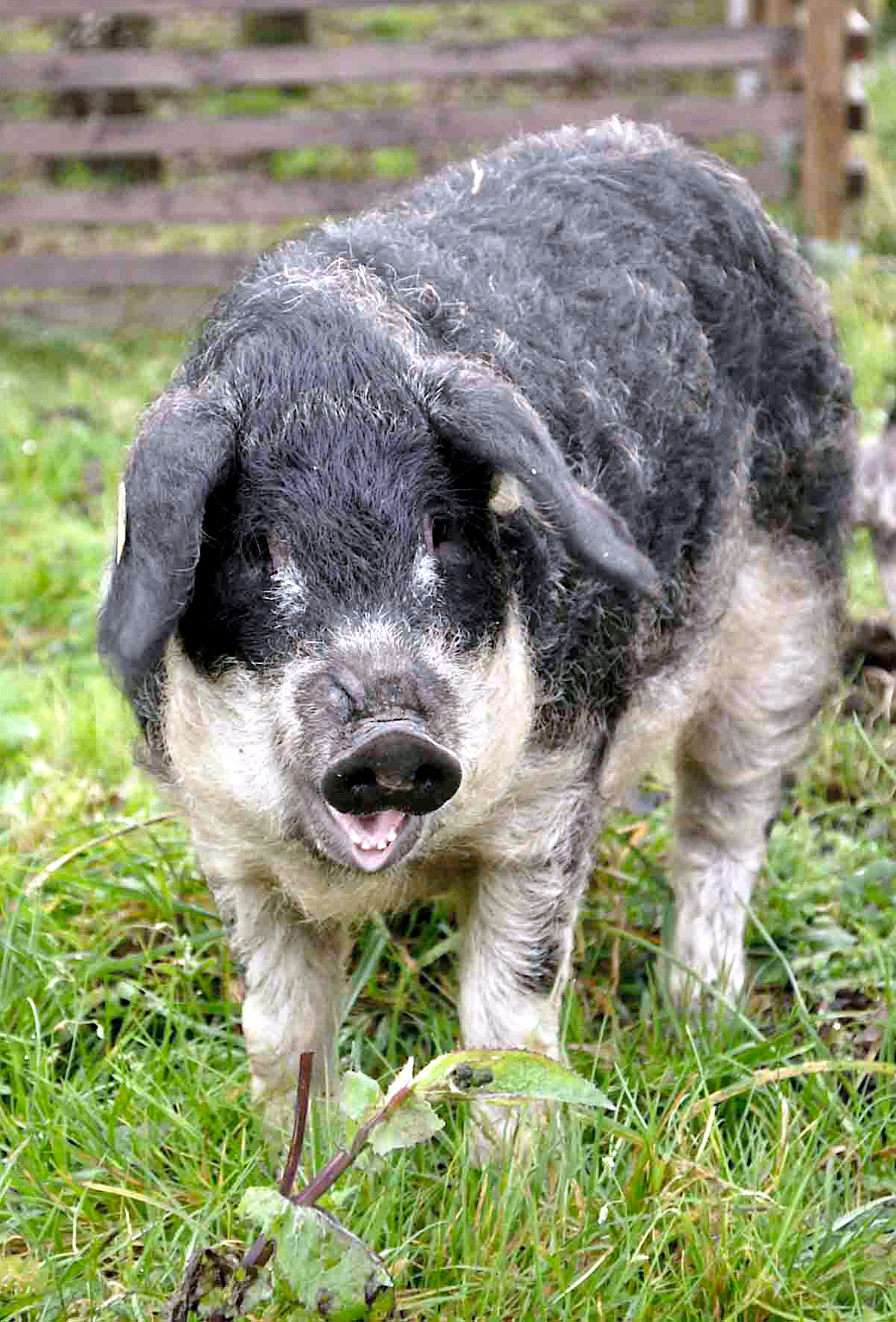 Mangalica, Wollschwein, Eber